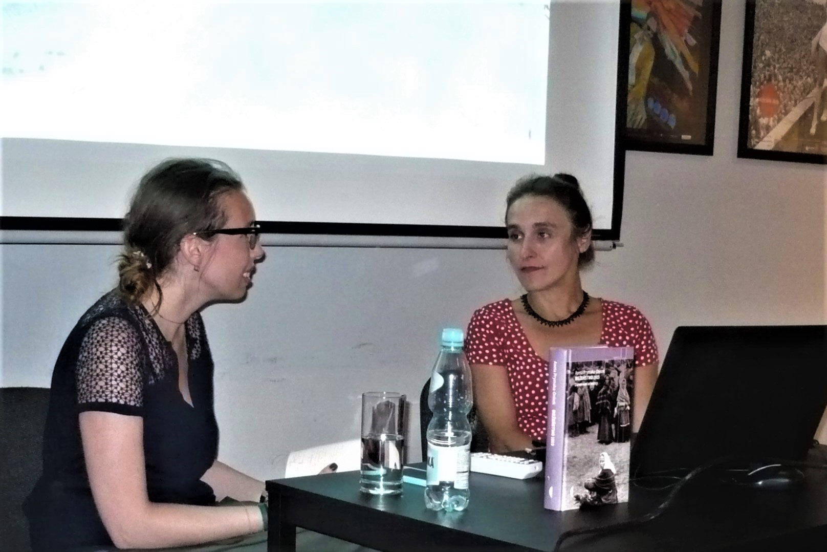 Aneta Prymaka-Oniszk podczas Festiwalu Kultury Żydowskiej, Kraków 2017